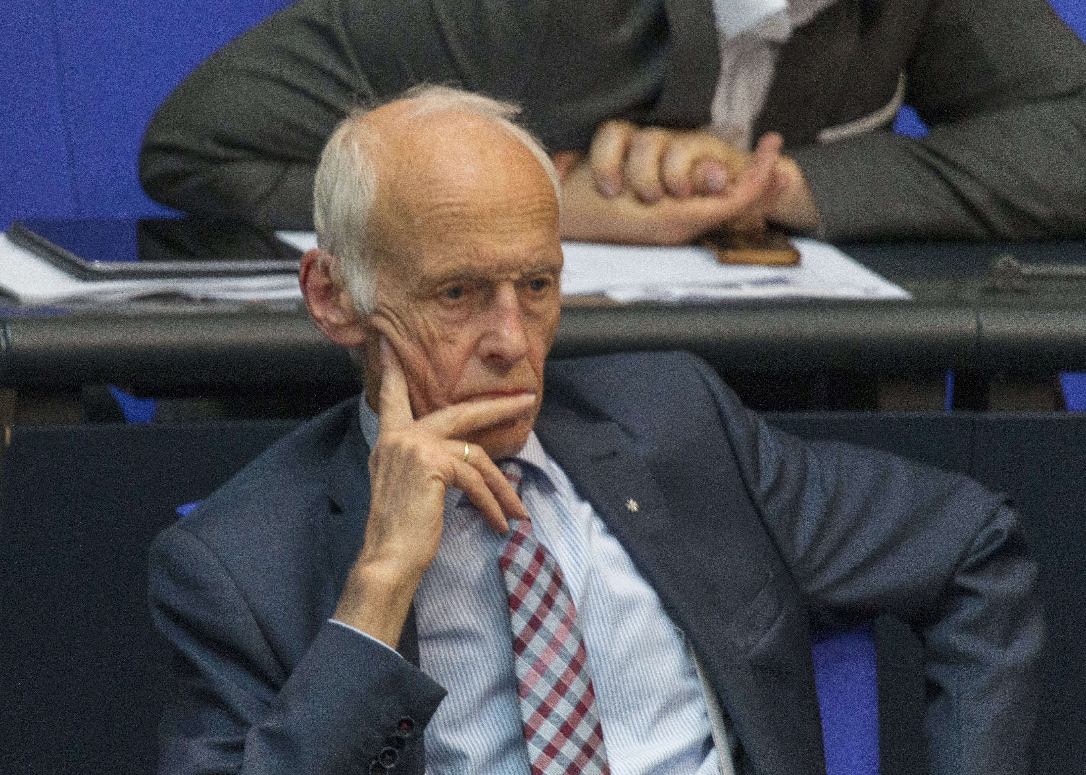 Wilhelm von Gottberg, Bundestagsabgeordneter der AfD während der Plenarsitzung des Deutschen Bundestages am 2. Juli 2020 in Berlin.